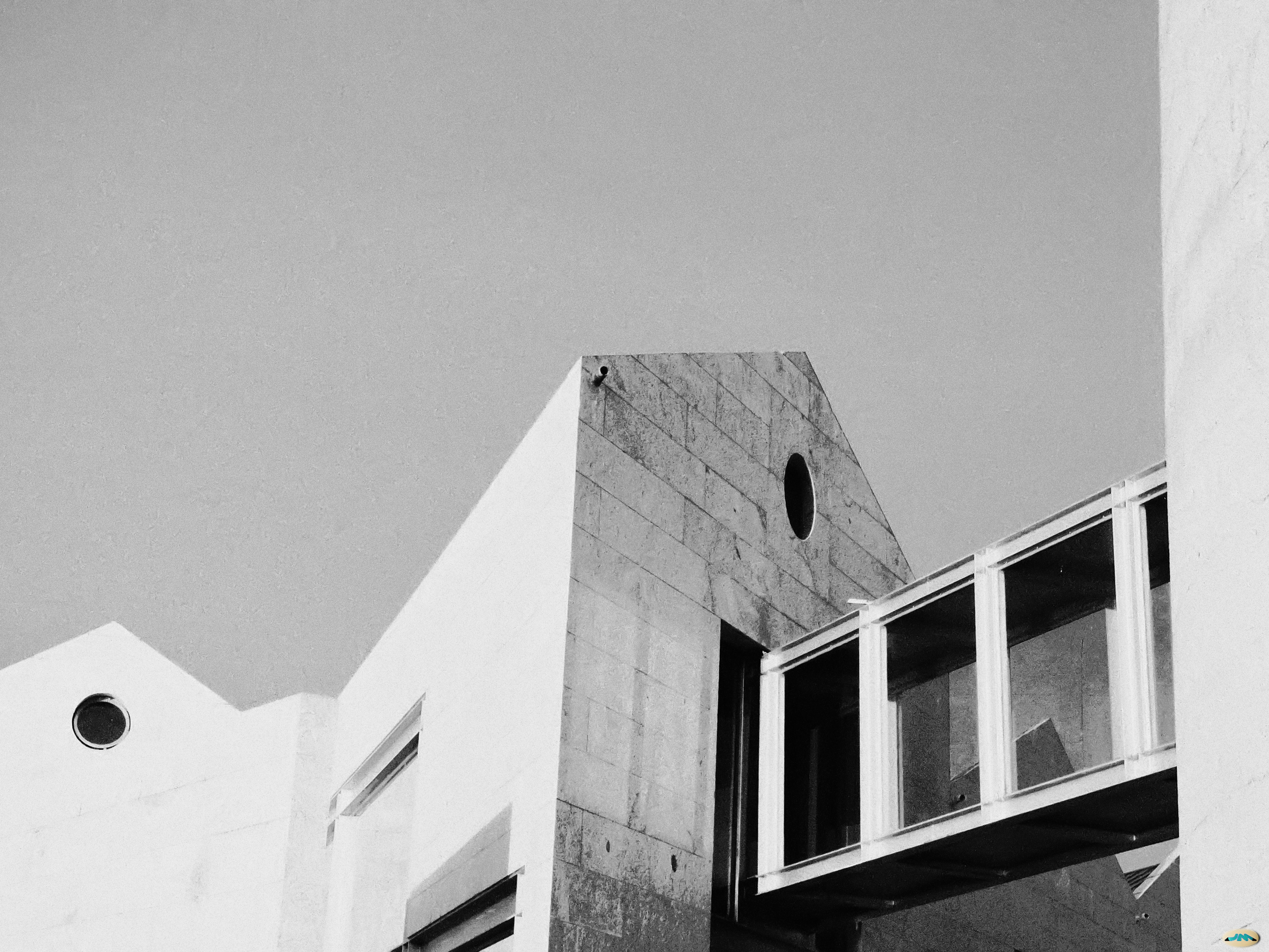 Museo do mar